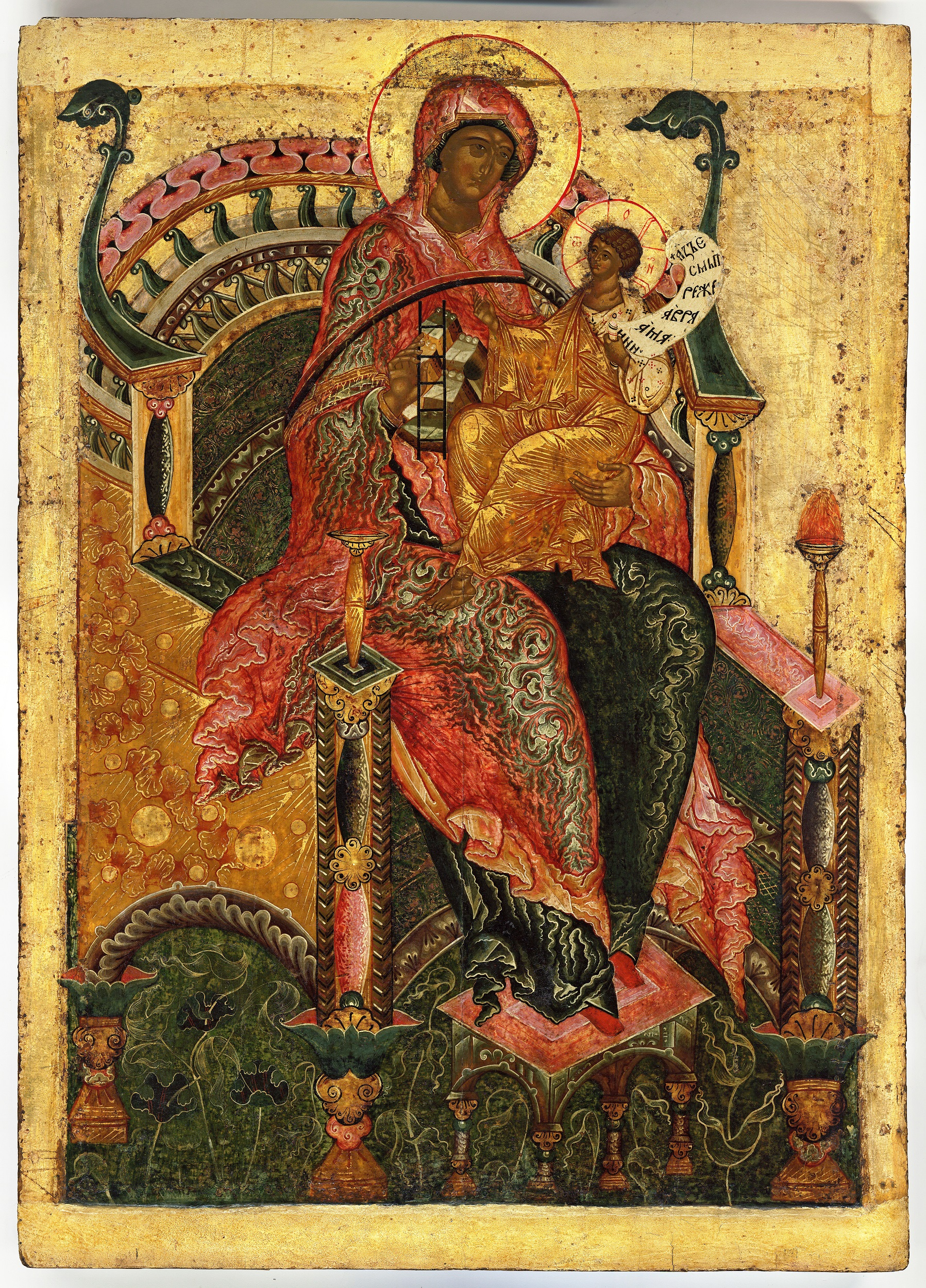 Икона Божией Матери «Гора Нерукосечная». До 1549 г. (ГМЗК). Находилась в местном ряду иконостаса Спасо-Преображенского собора. Соловецкий монастырь. 1560-е г.